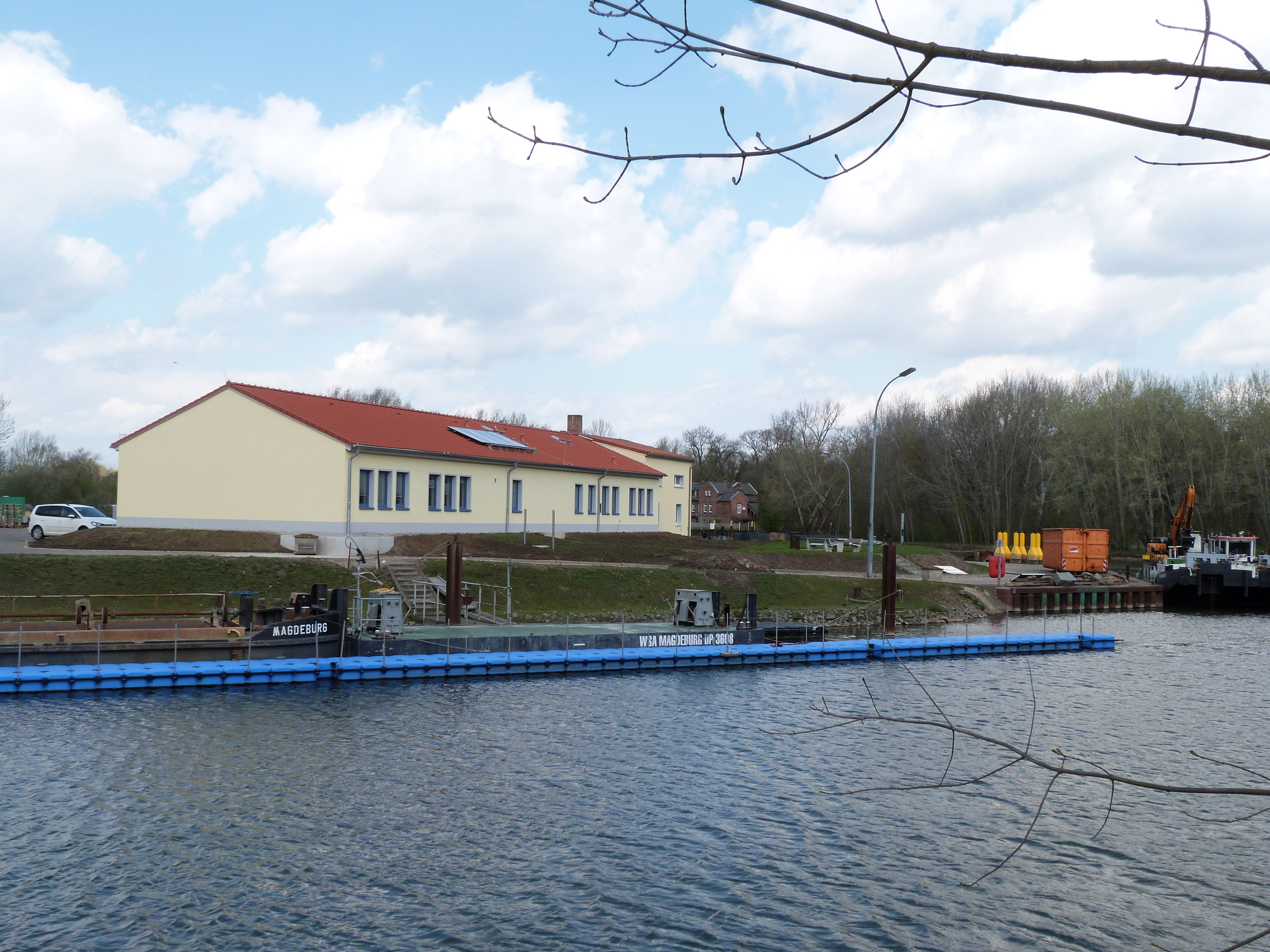 Einfahrt zum Sophienhafen, Gebäude des Wasserstraßen- und Schifffahrtsamtes Magdeburg, Halle (Saale)